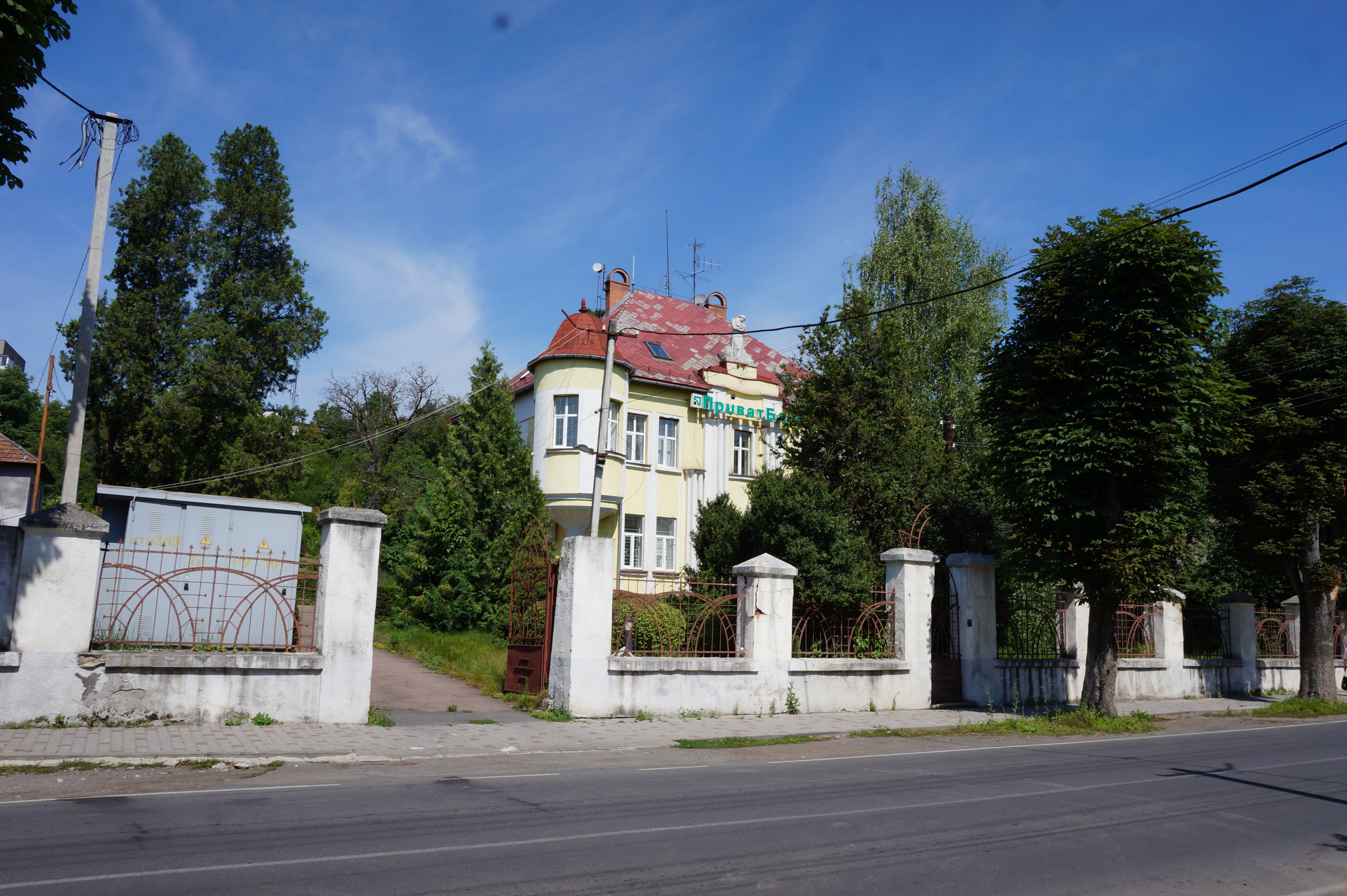 Особняк, в якому розміщався штаб 18-ої Армії 4-го Українського фронту (мур.), Ужгород, вул. Берчені, 45